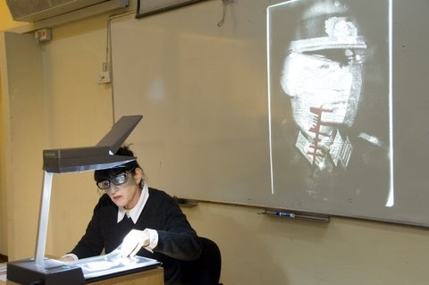 נעמי יואלי השולחן עבודת כיתה צילום אלדד מאסטרו